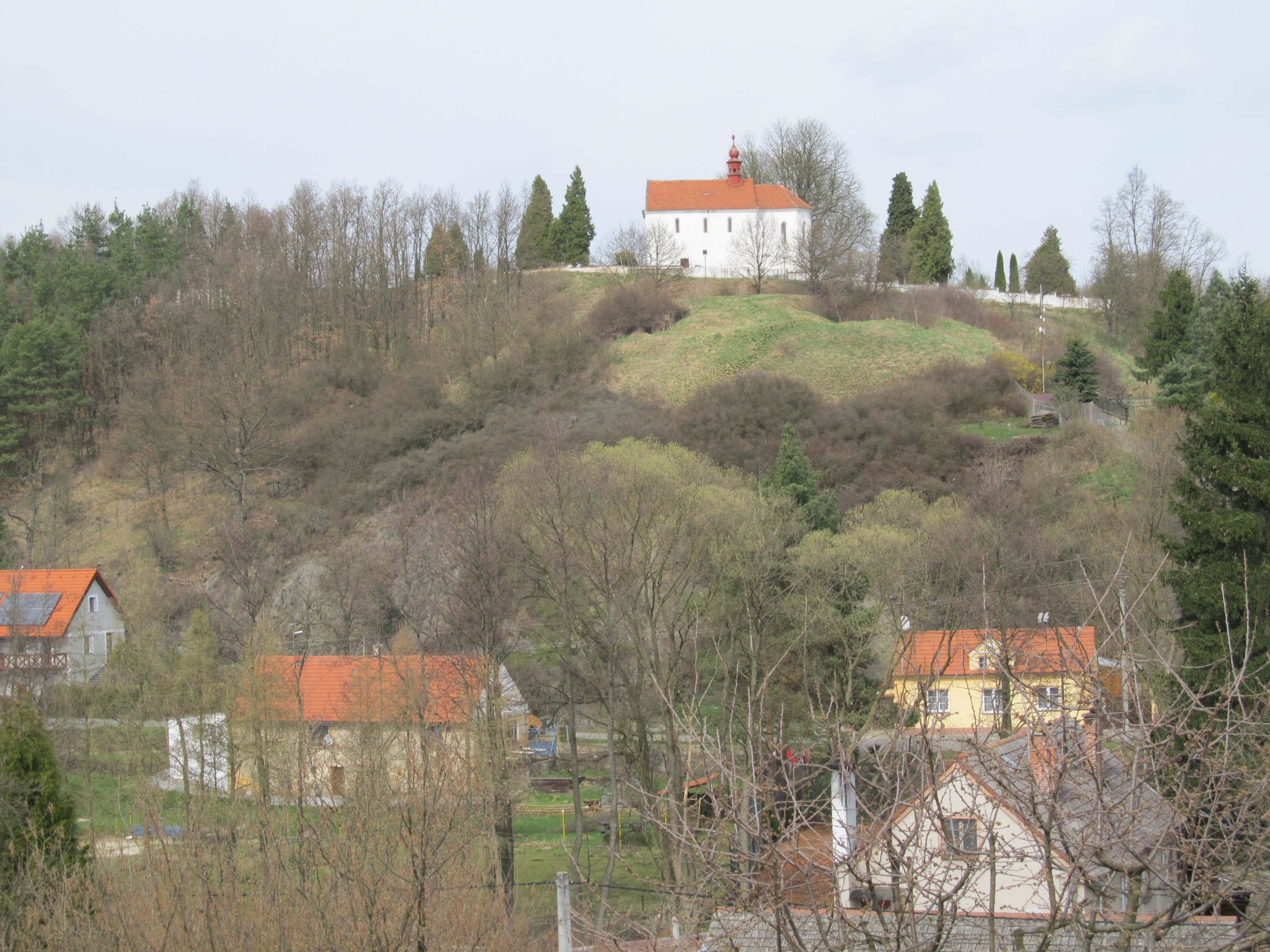 Všeruby - hradisko a kostel sv. Martina